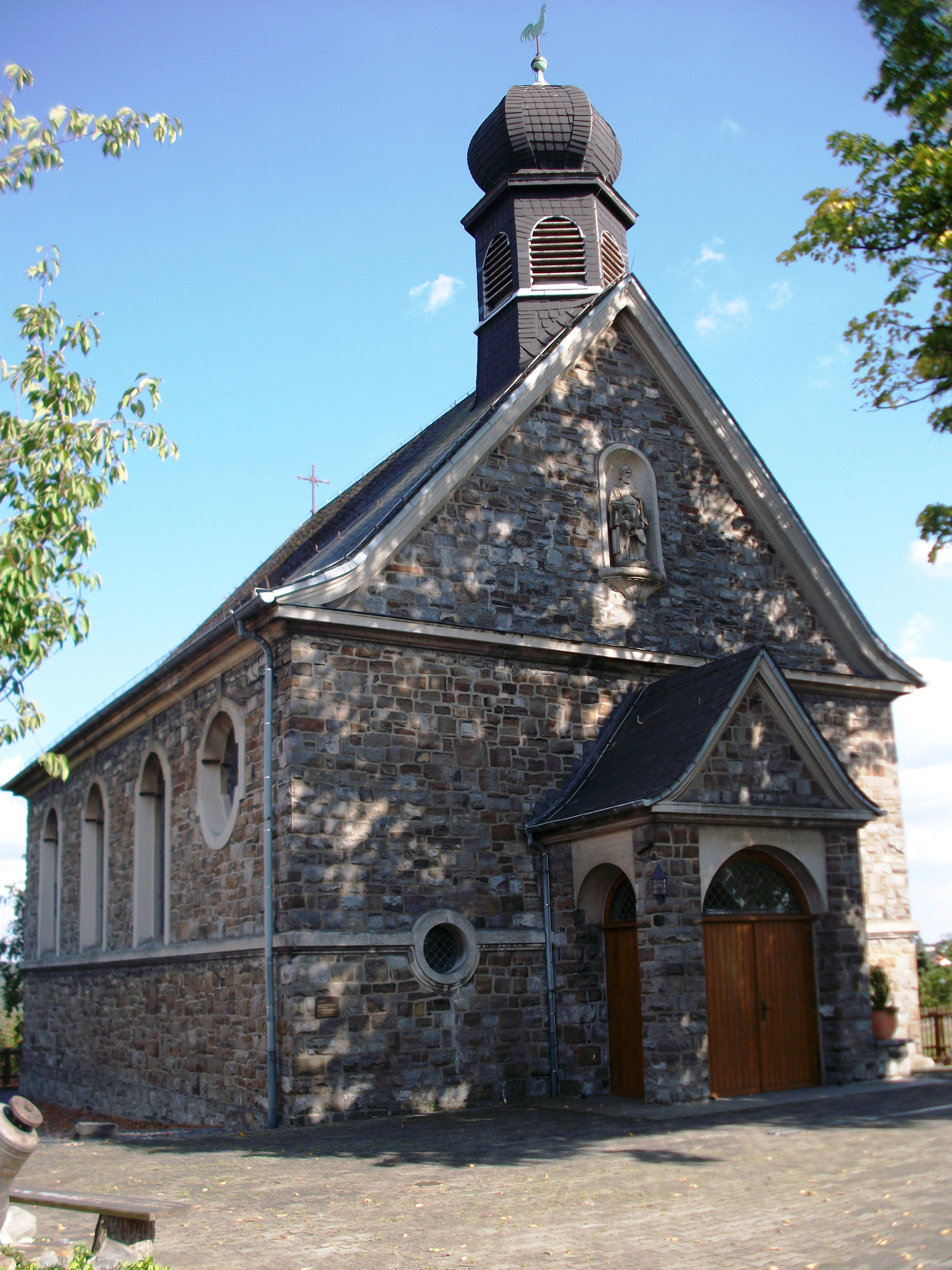 St. Isidor Kirche in Arnsberg-Bachum